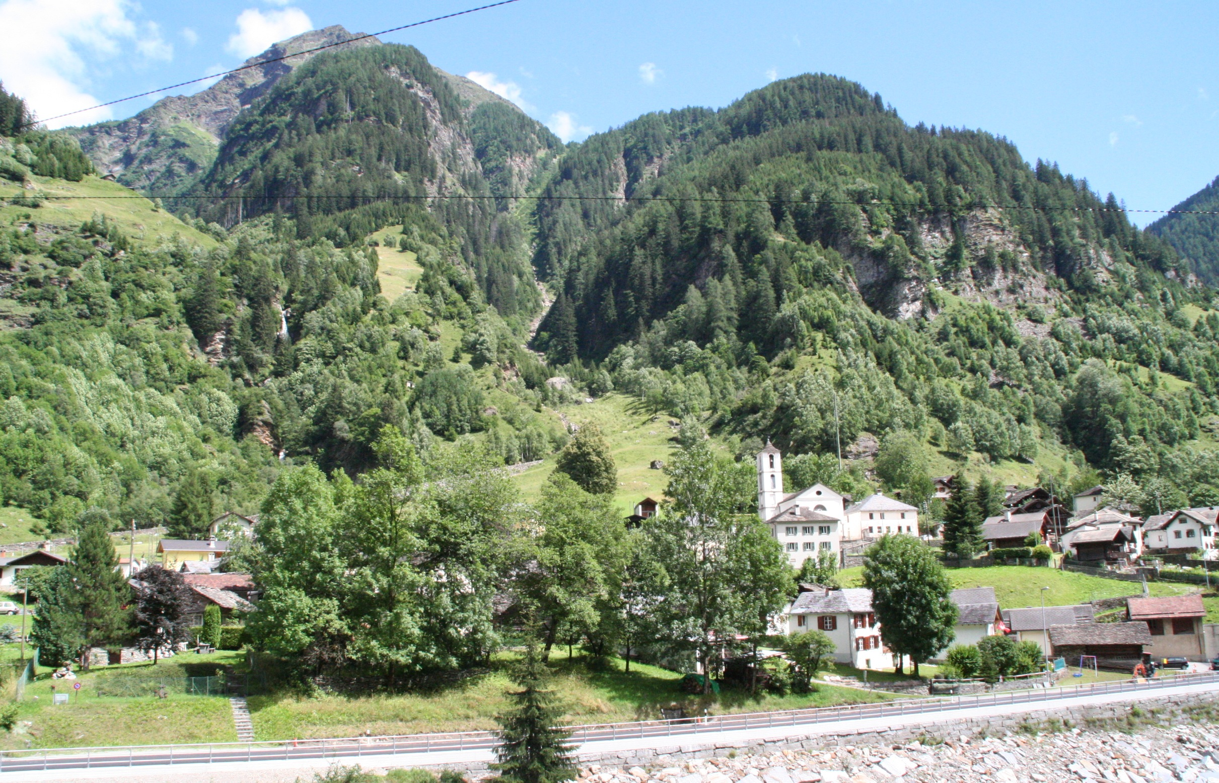 Rossa GR